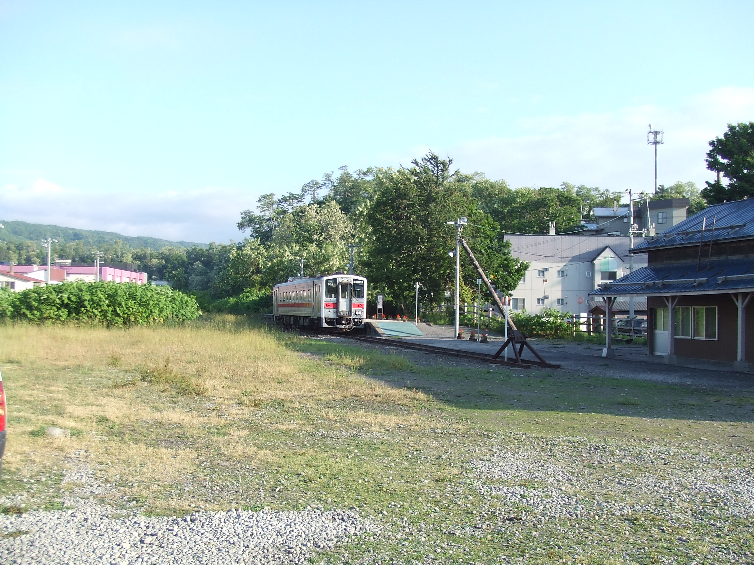 増毛駅 駅構内の様子